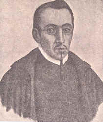 Portrait of Carlos de Sigüenza y Góngora